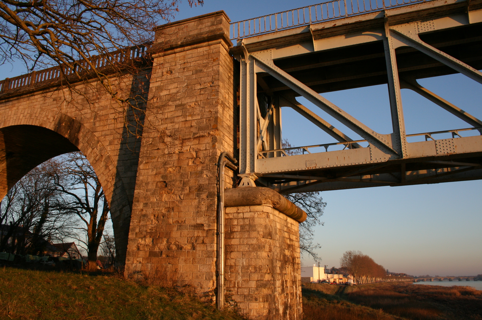 Viaduc ferroviaire de Gien – Commune de Gien – Département du Loiret – France – Construit en 1893